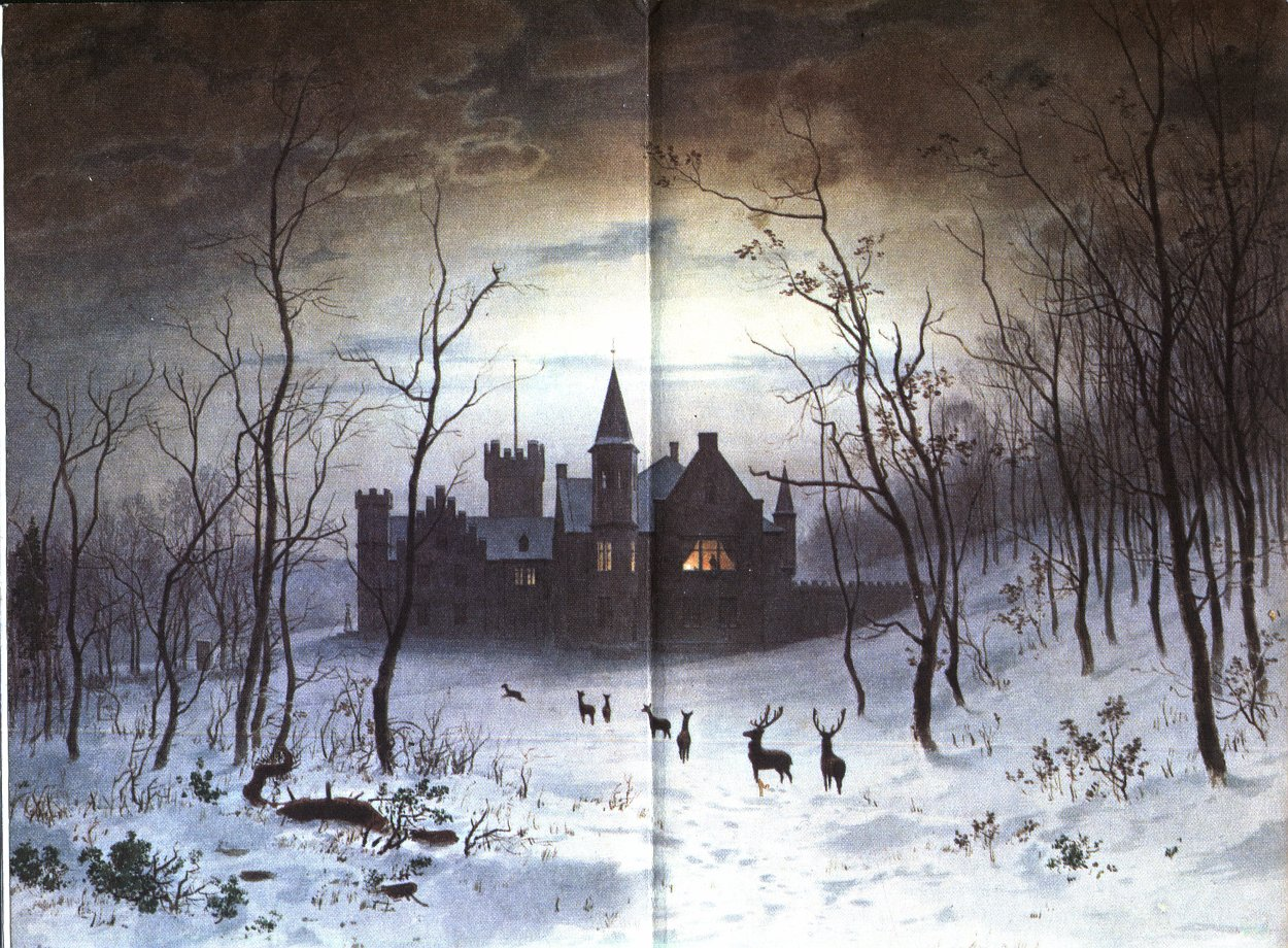 Jagdschloss Waldleiningen, Aquarell von C. Theodor Reiffenstein